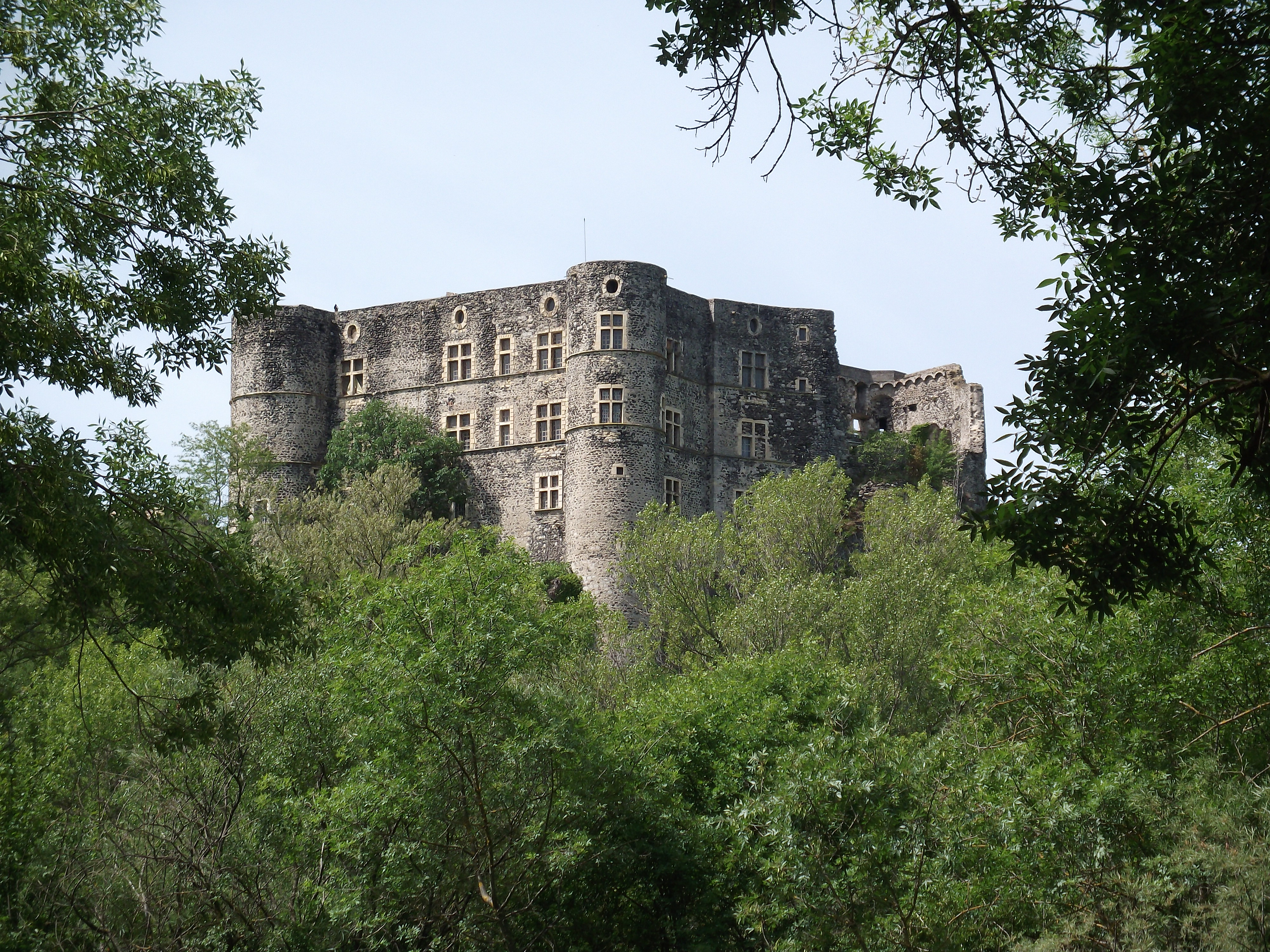 Château d'Alba-la-Romaine en Ardèche en 2012